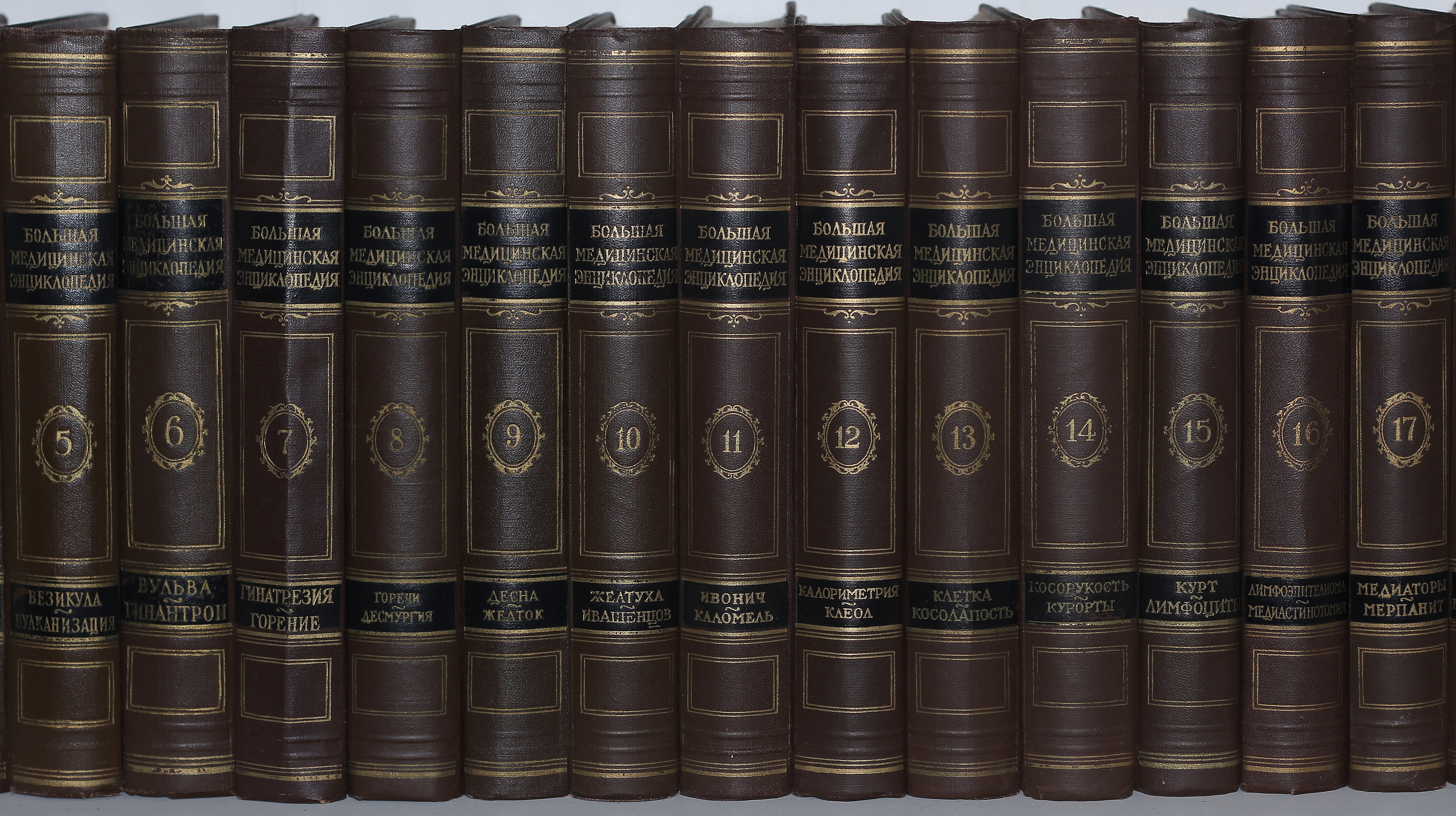 Большая медицинская энциклопедия, второе издание под редакцией академика А. Н. Бакулева.